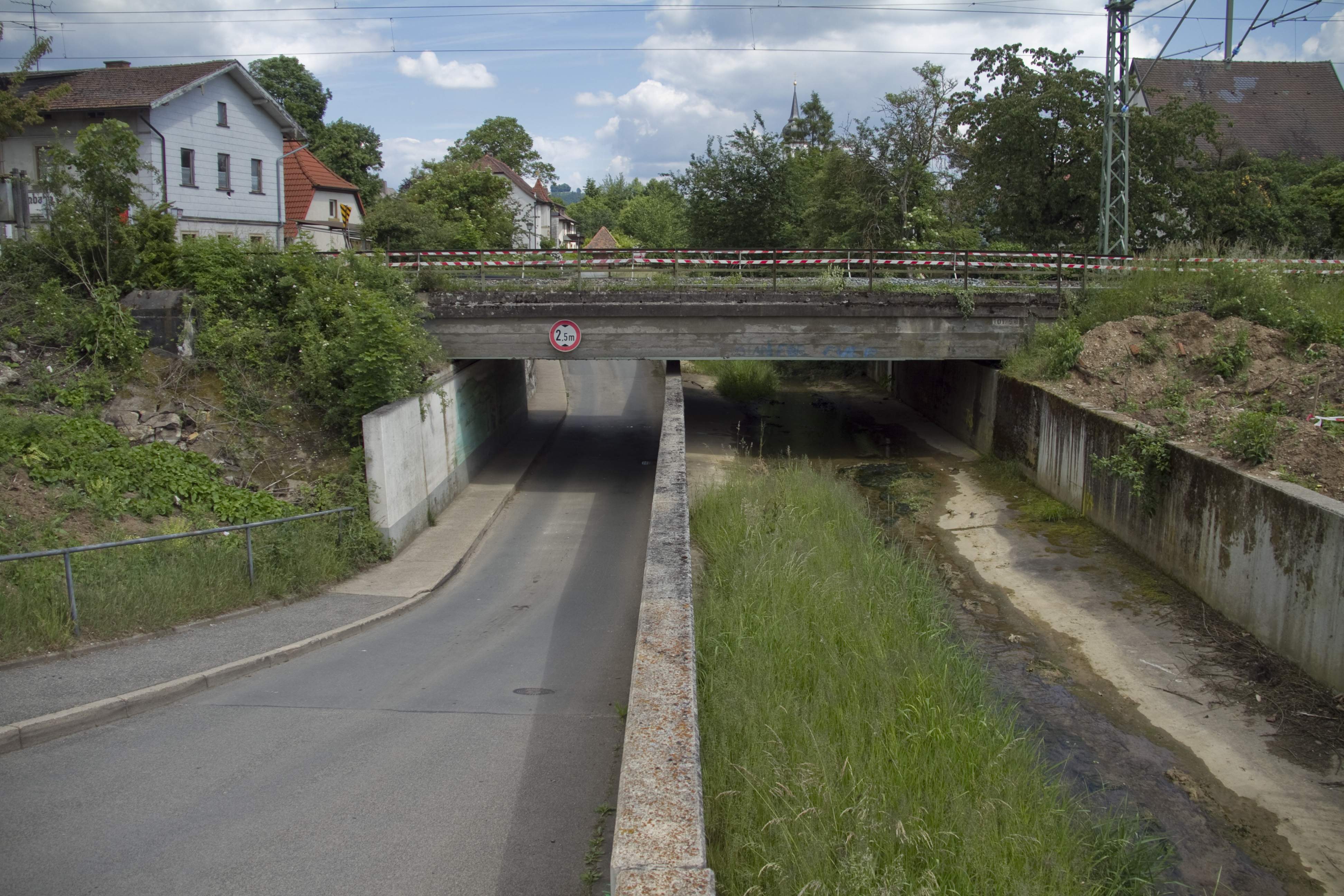 EÜ Kellbach in Ebensfeld 2014 vor der Erweiterung